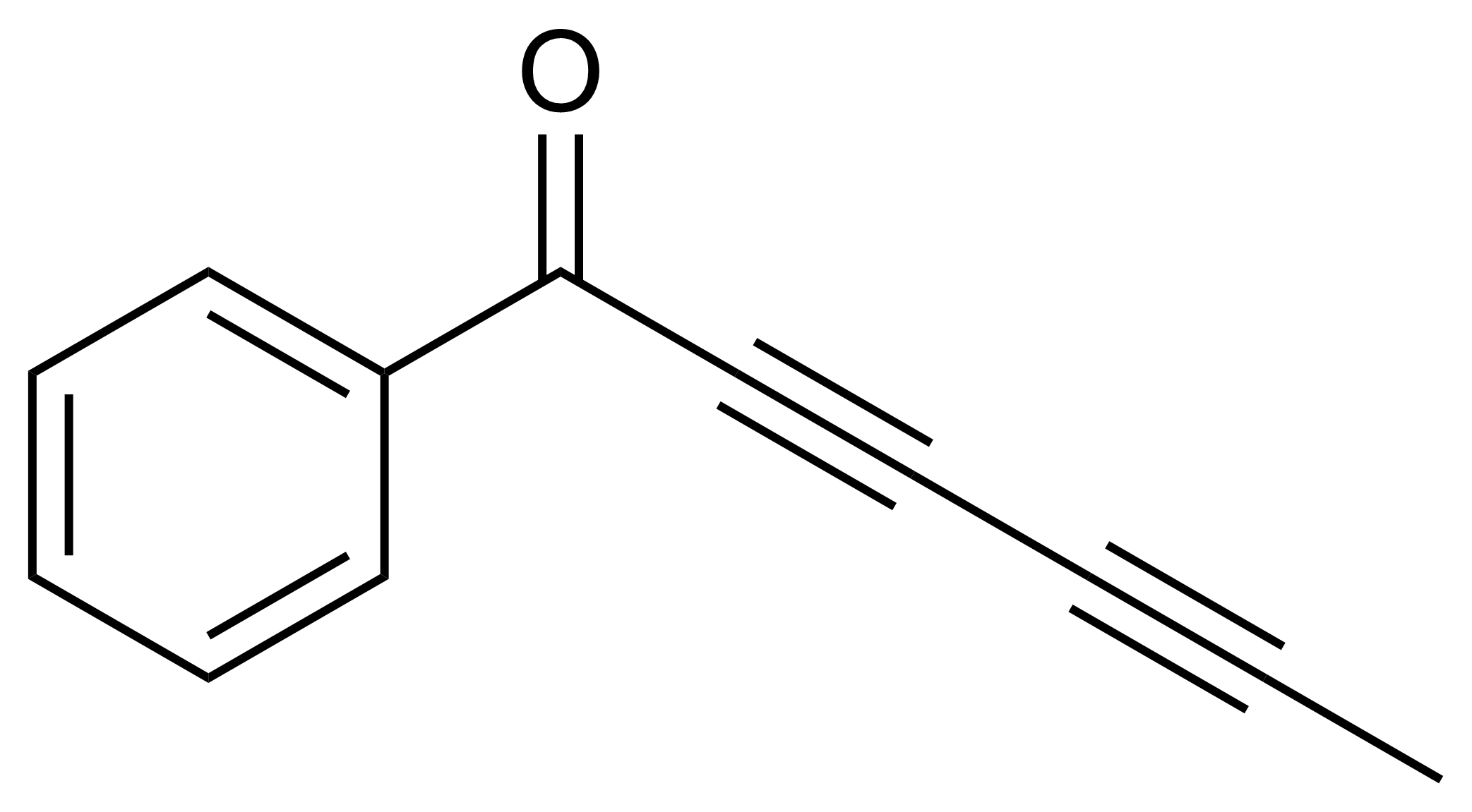 Capilline